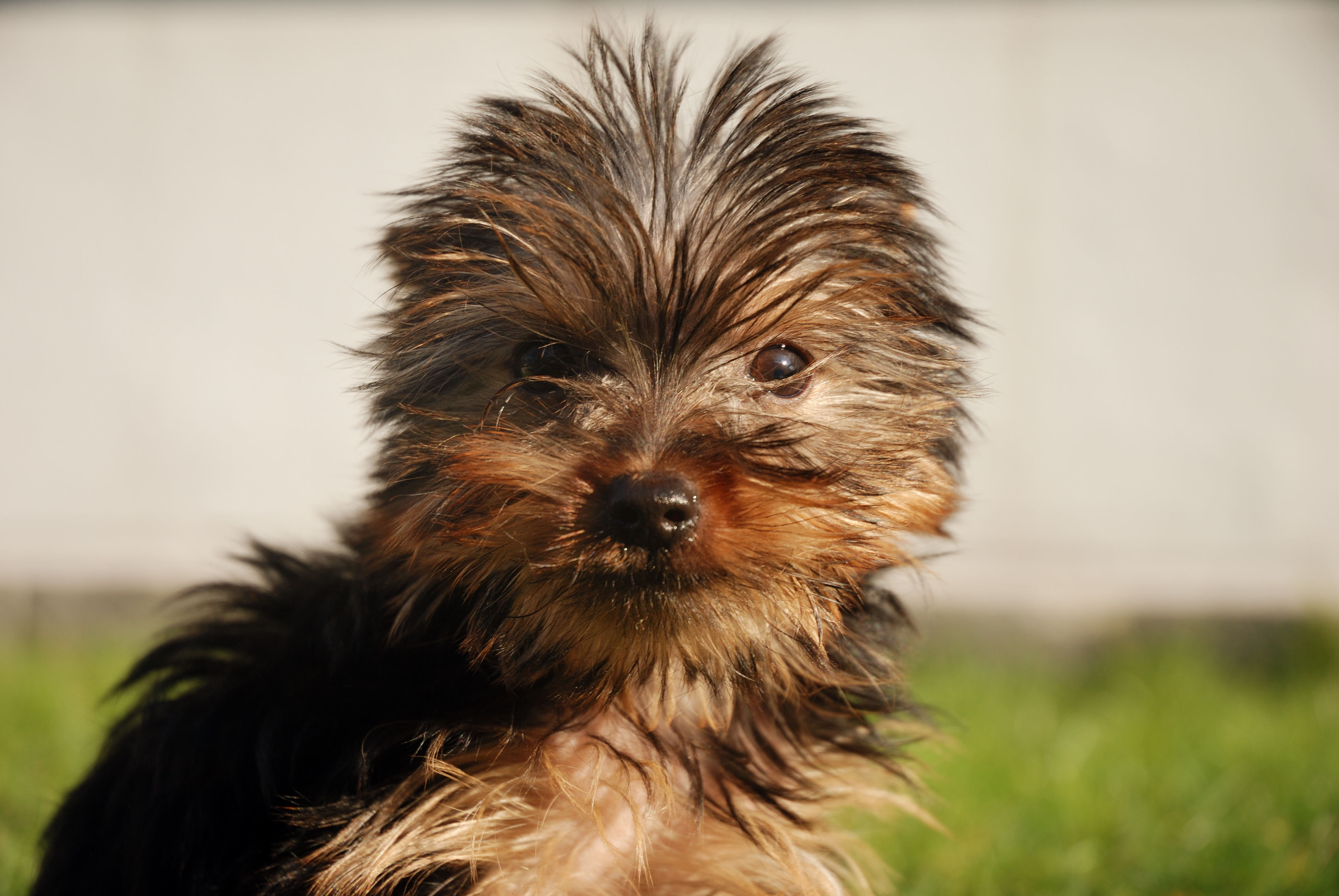 Yorkshire Terrier.